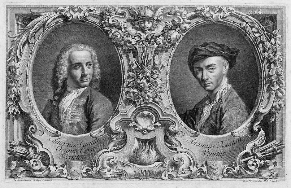 Frontispice du "prospectus", montrant Canaletto et son graveur Visentini